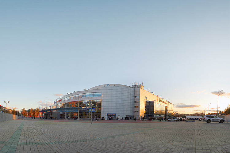 Ледовый дворец «Арена Мытищи»